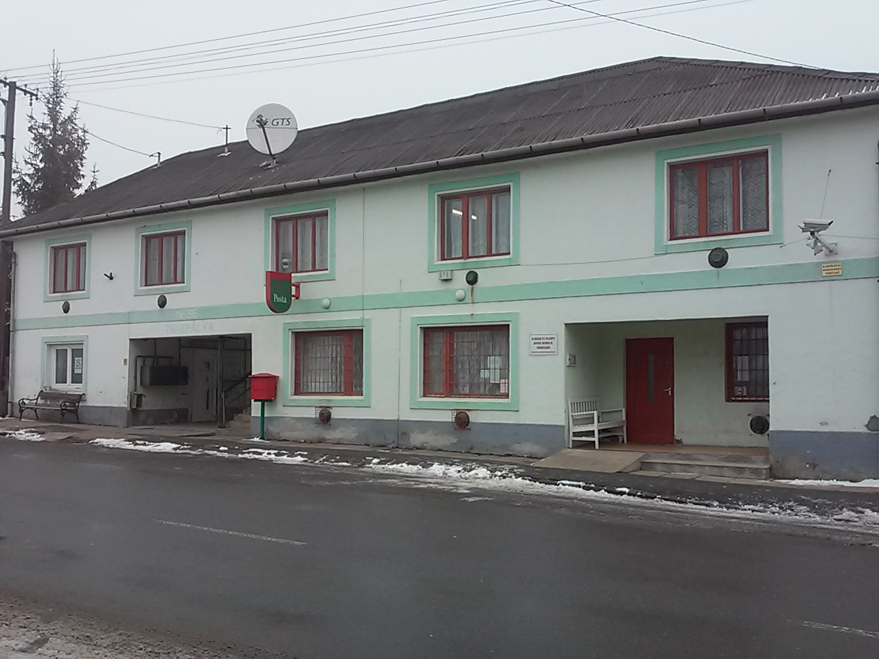 Mátraterernye-Nádújfalu posta